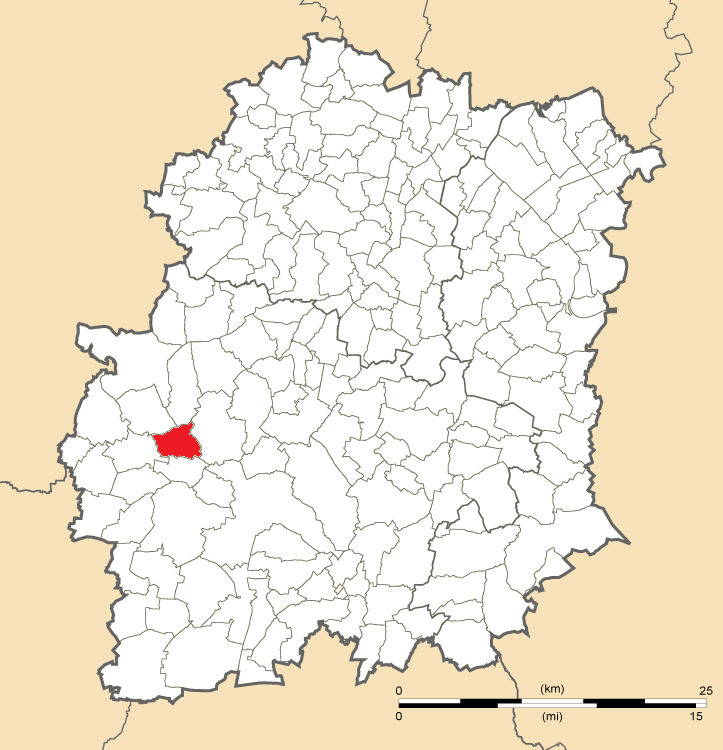 Carte de position de La Forêt-le-Roi en Essonne (91)